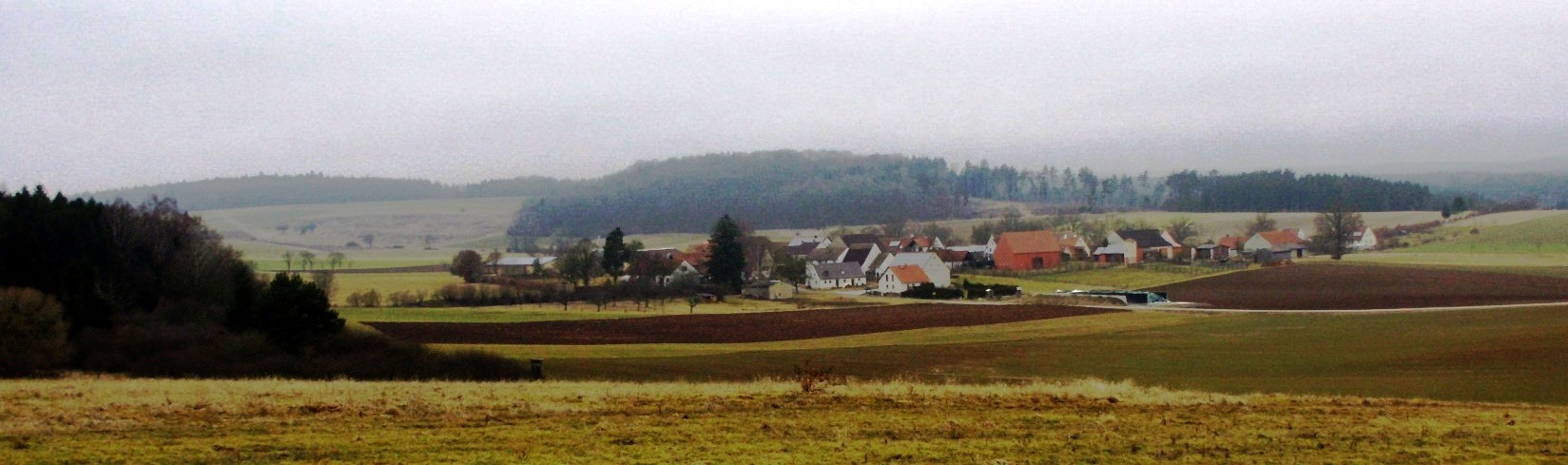 Filchenhard, Gemeindeteil von Gunzenhausen im mittelfränkischen Landkreis Weißenburg-Gunzenhausen